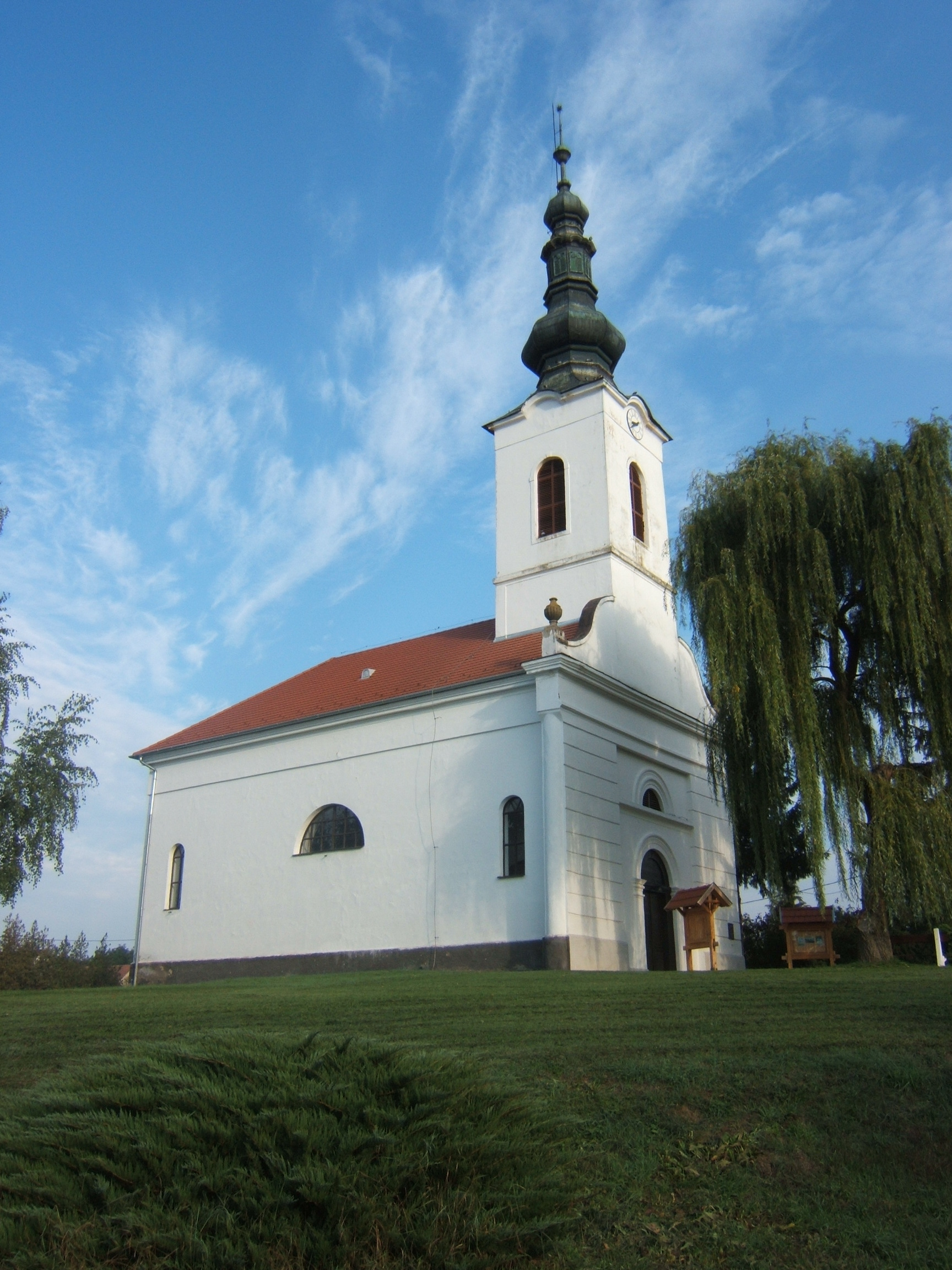 Rinyaszentkirály, református templom